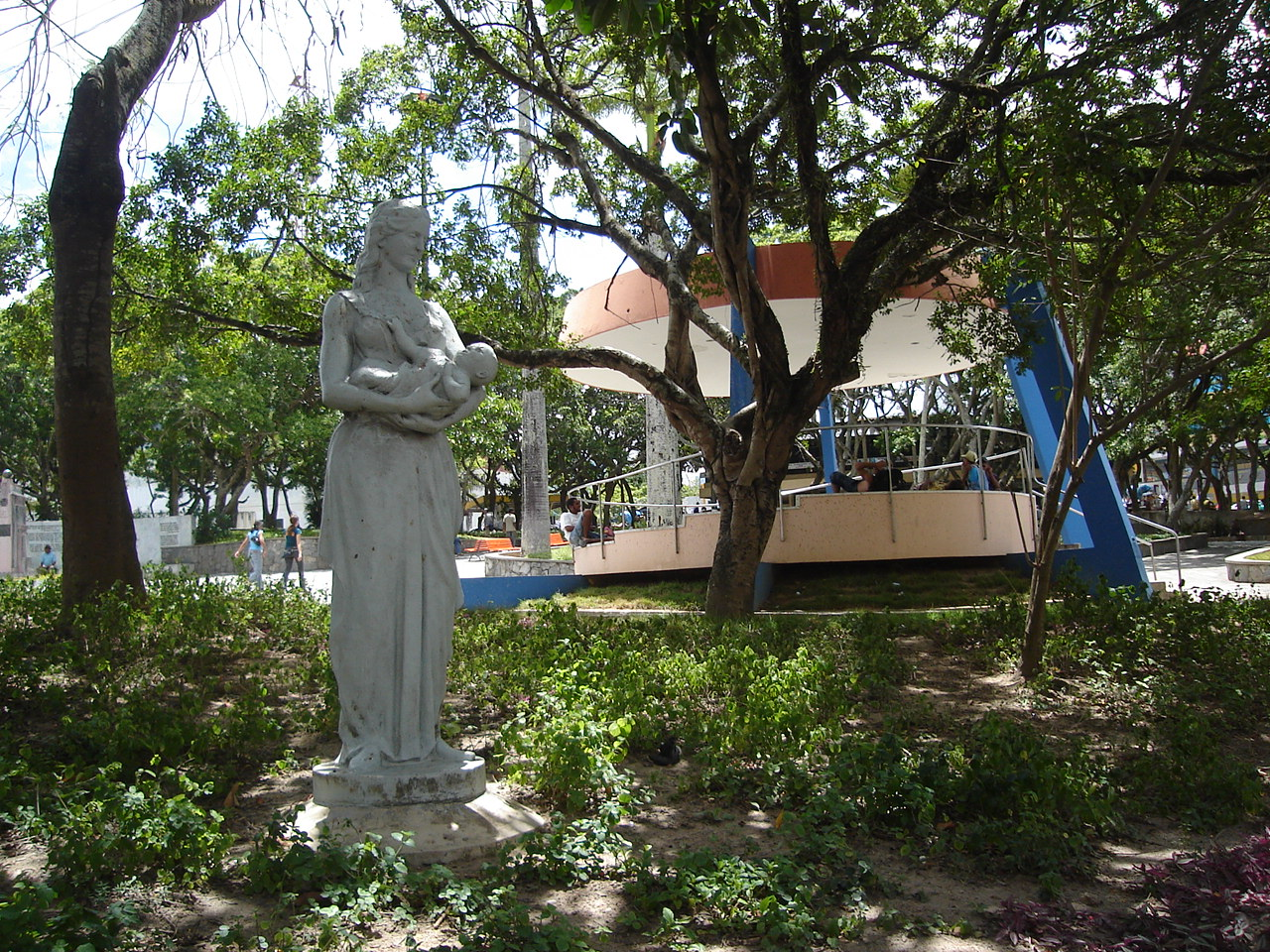 Foto da Praça Clementino Procópio.